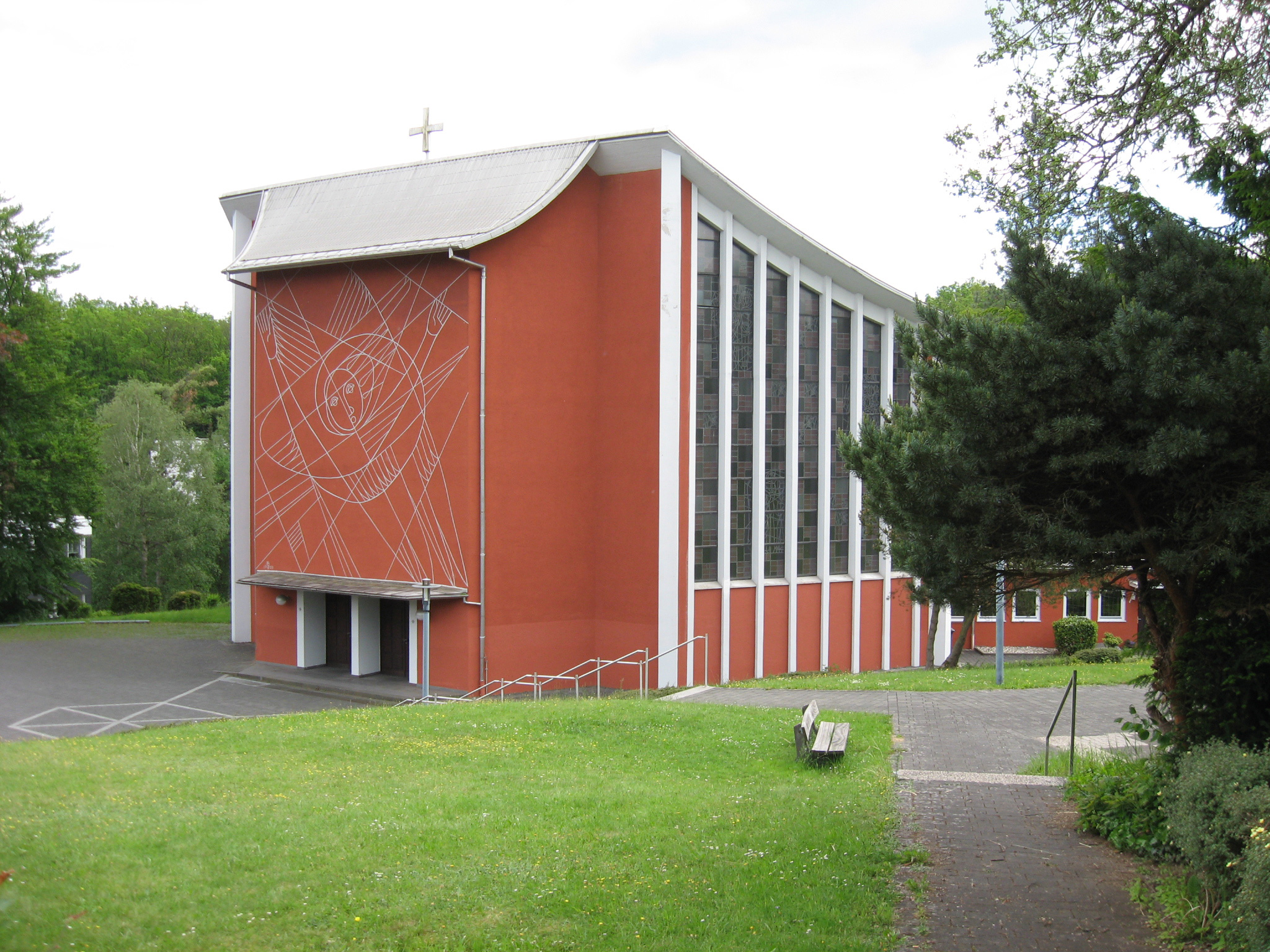 Die Kirche Sankt Maria Immaculata im Wenscht in Siegen wurde 1958 als katholische Kirche für die (Stahlarbeiter-)Siedlung Wenscht errichtet.